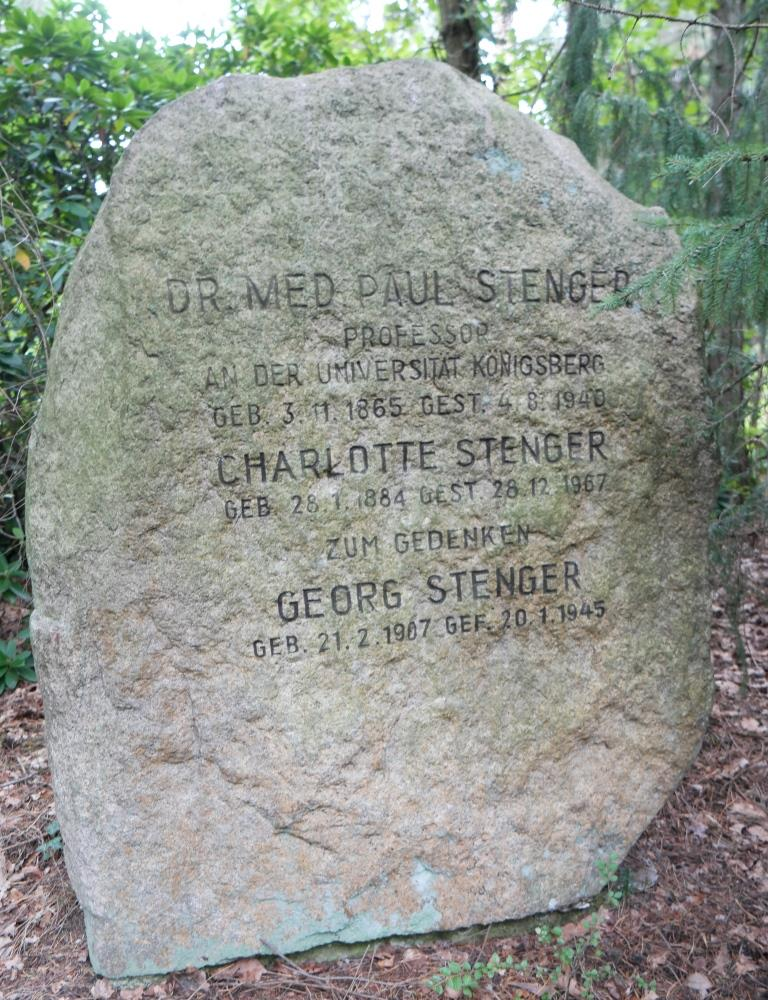 Grab des Arztes Paul Stenger (1865-1940) auf dem Südwestkirchhof in Stahnsdorf